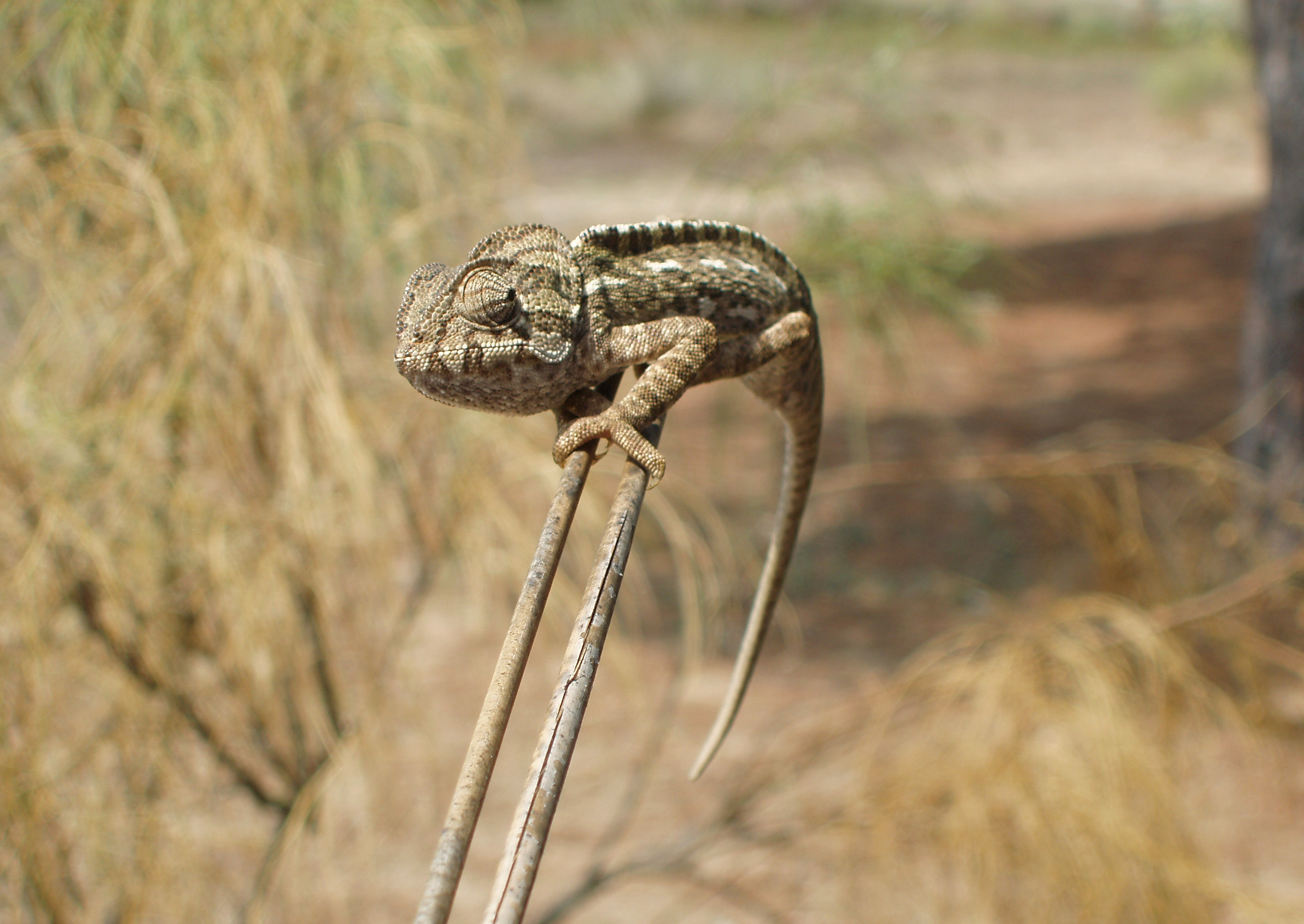 Chamaeleo chamaeleon